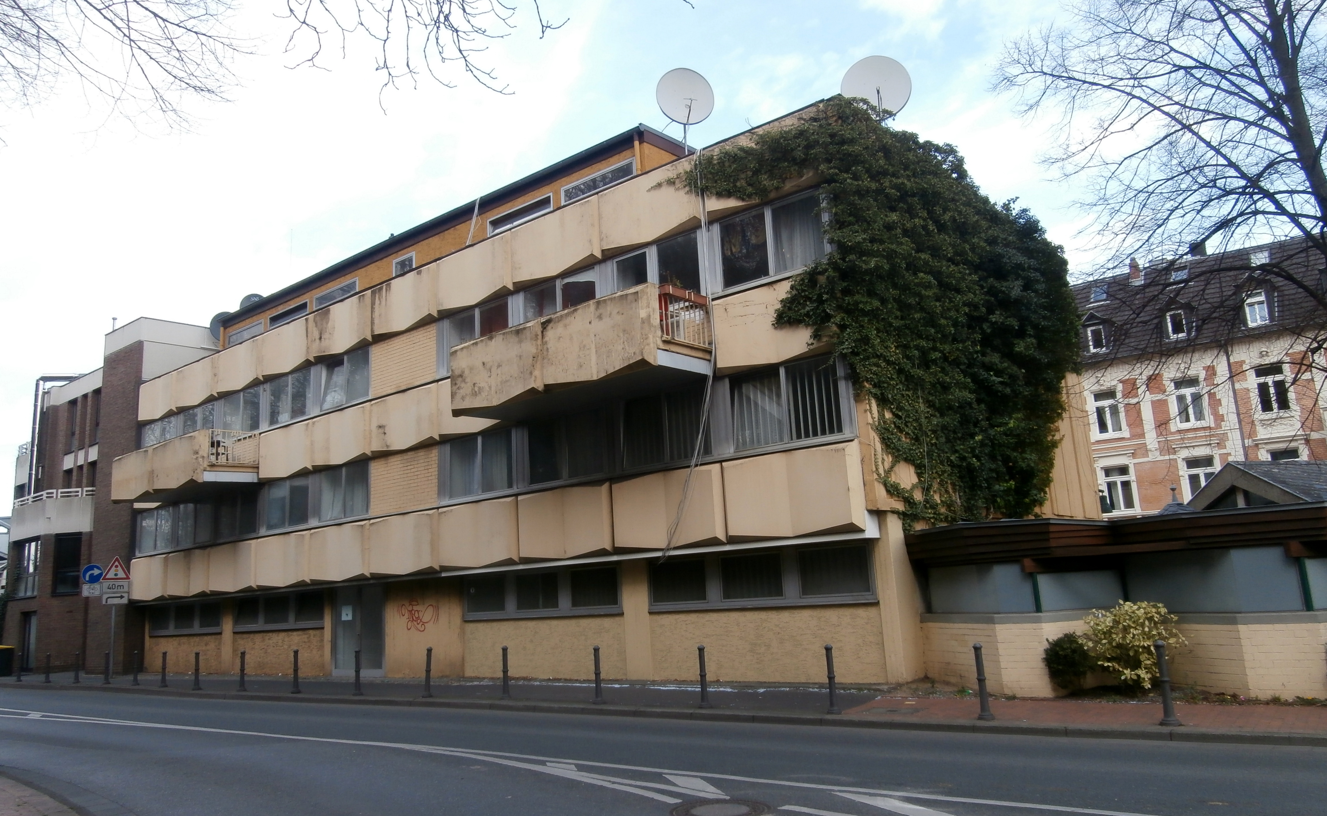 Ehemalige Kanzlei der Botschaft von Finnland, Friesdorfer Straße 1, Bad Godesberg